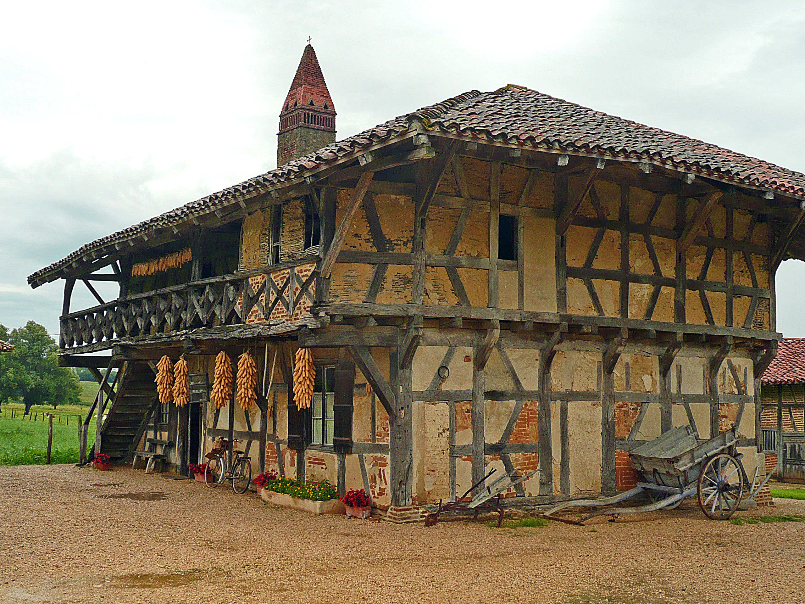 Ferme-musée de Saint-Trivier-de-Courtes, en Bresse de l'Ain. Voir sa remarquable cheminée sarrazine.